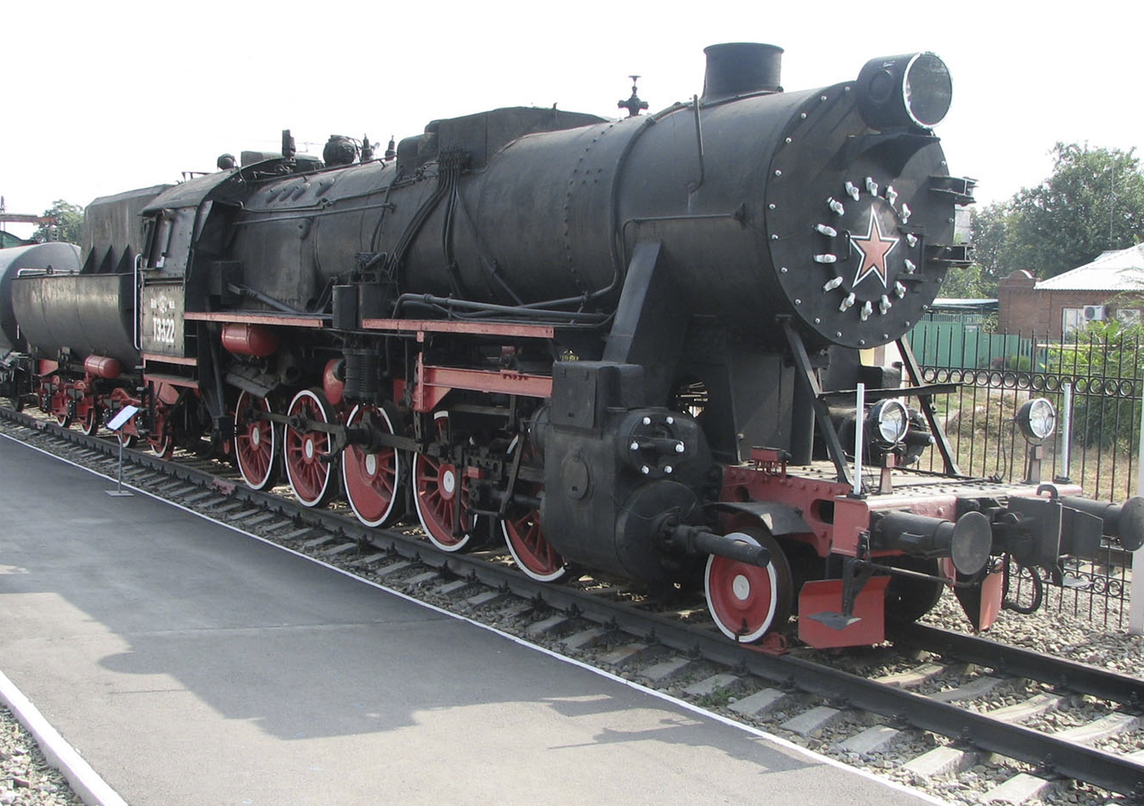 Паровоз построен в 1942 году заводом Флоридсдорф, Австрия